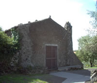 Chiesa della Madonna Bambina, Mompileri